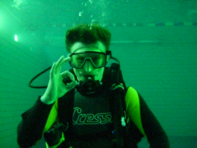 Ok.